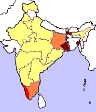 Lok Sabha 1999. Gjord av Soman.